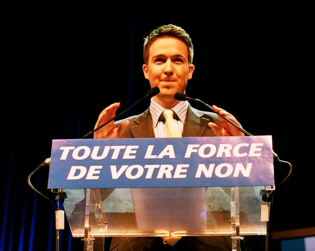 Guillaume Peltier au meeting du MPF devant 5000 partisans